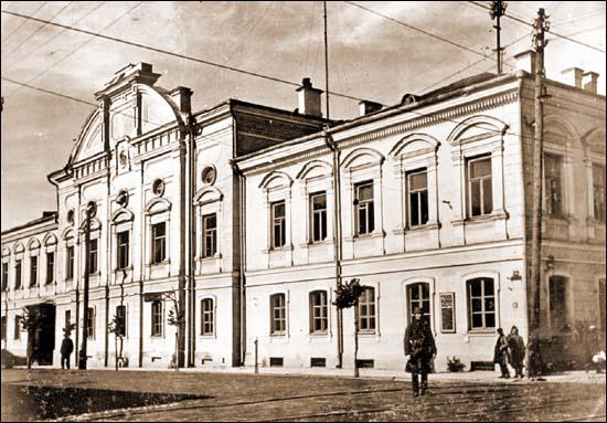 Здание Минского дворянского депутатского собрания.